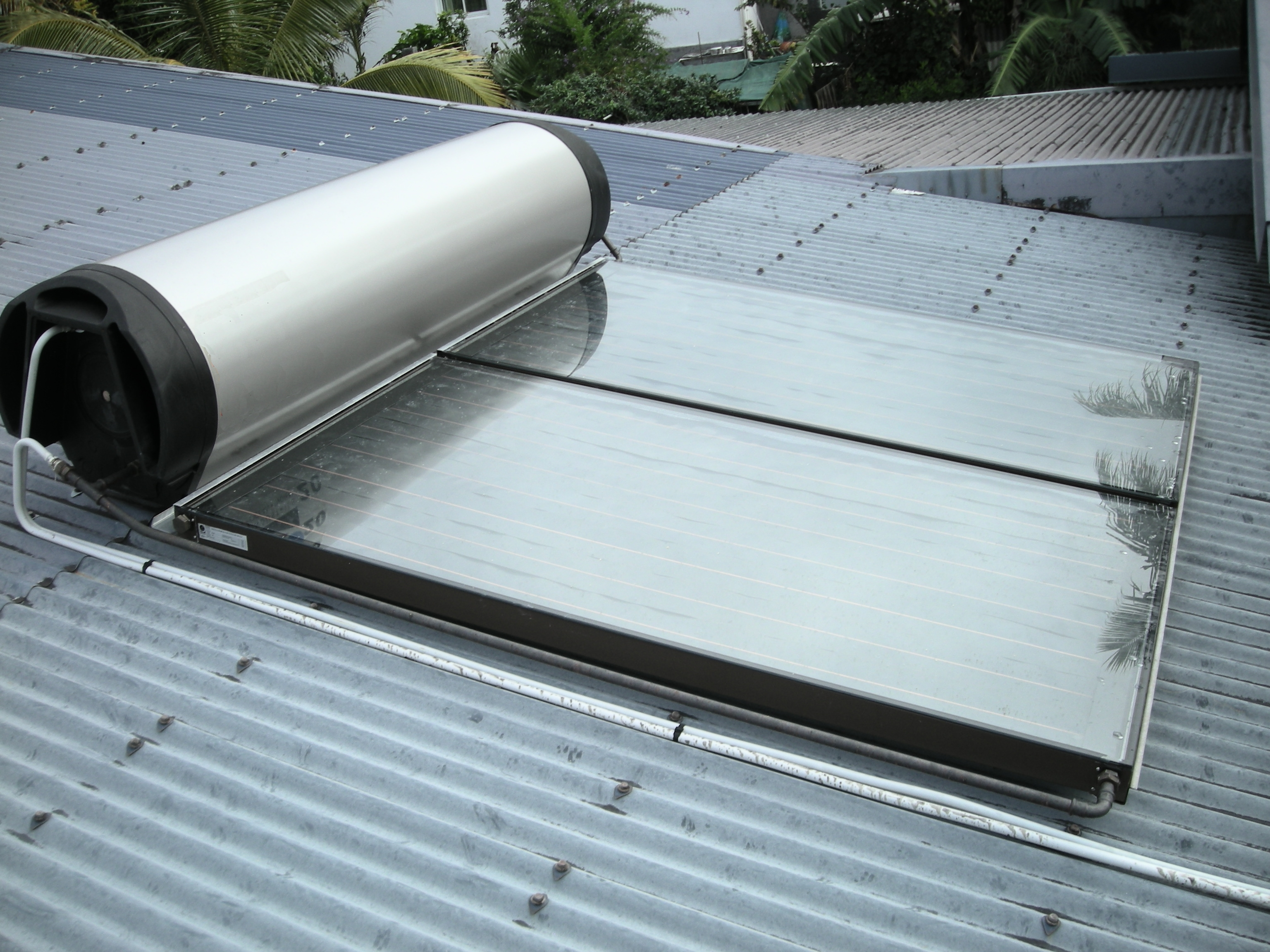 Chauffe eau solaire monobloc en surimposition de la toiture (marque effacée)